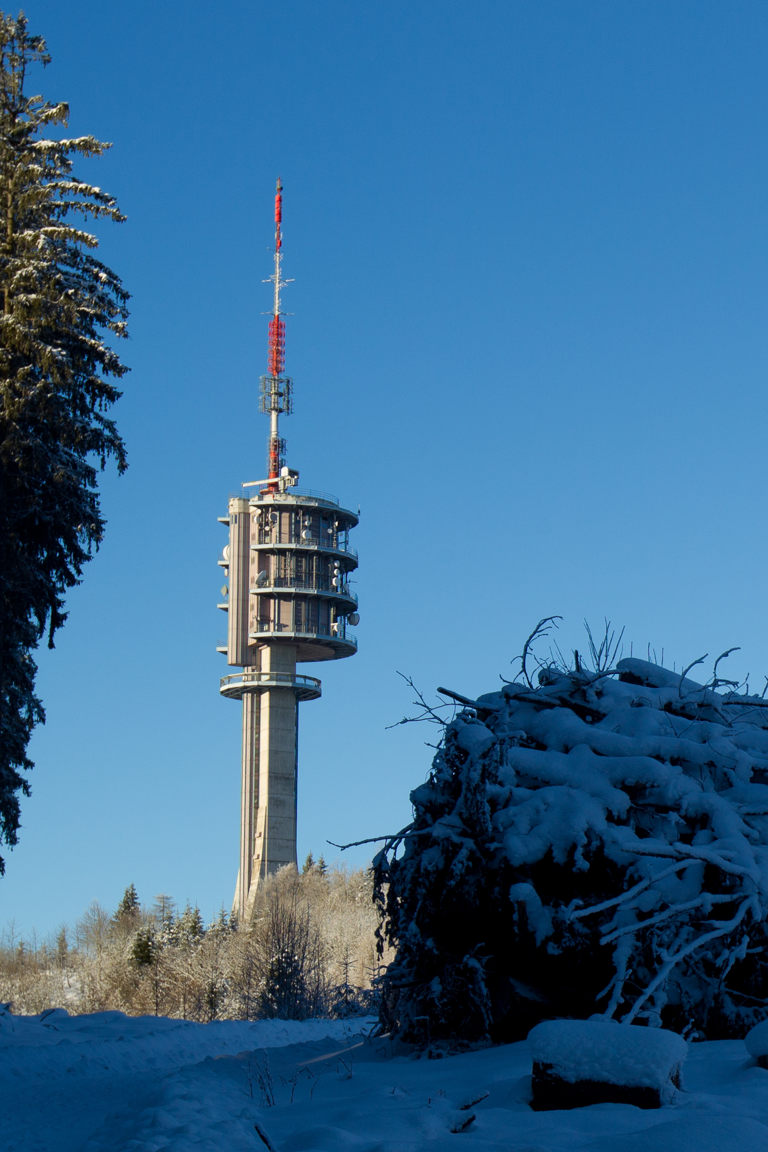 Sendeturm Mont-Gibloux